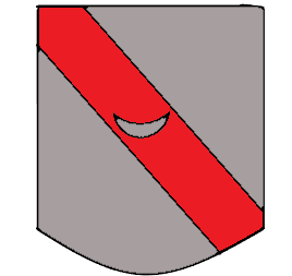 Le blason des Soubiran-Arifat